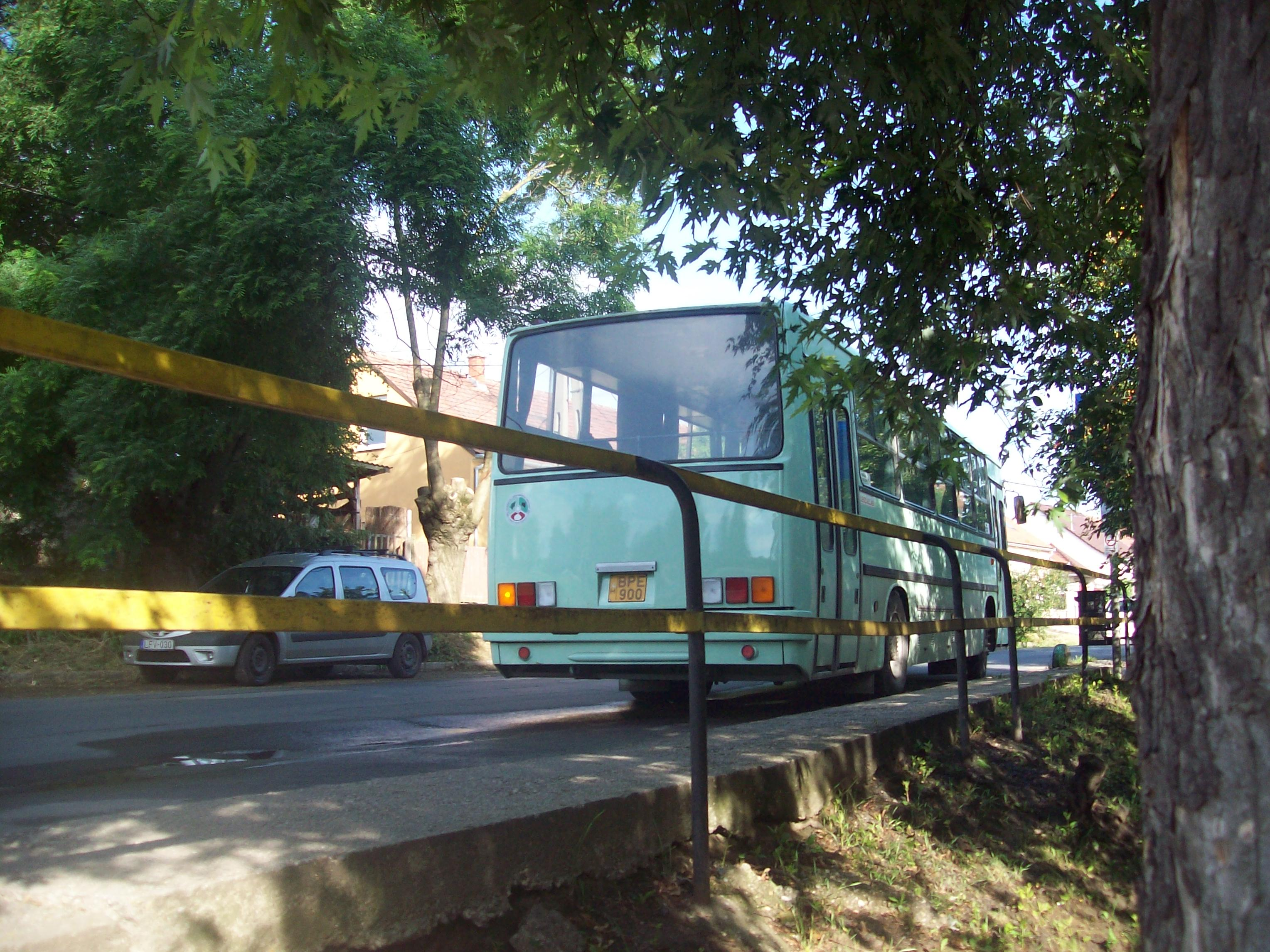 5-ös busz érkezett Dávidföldre.